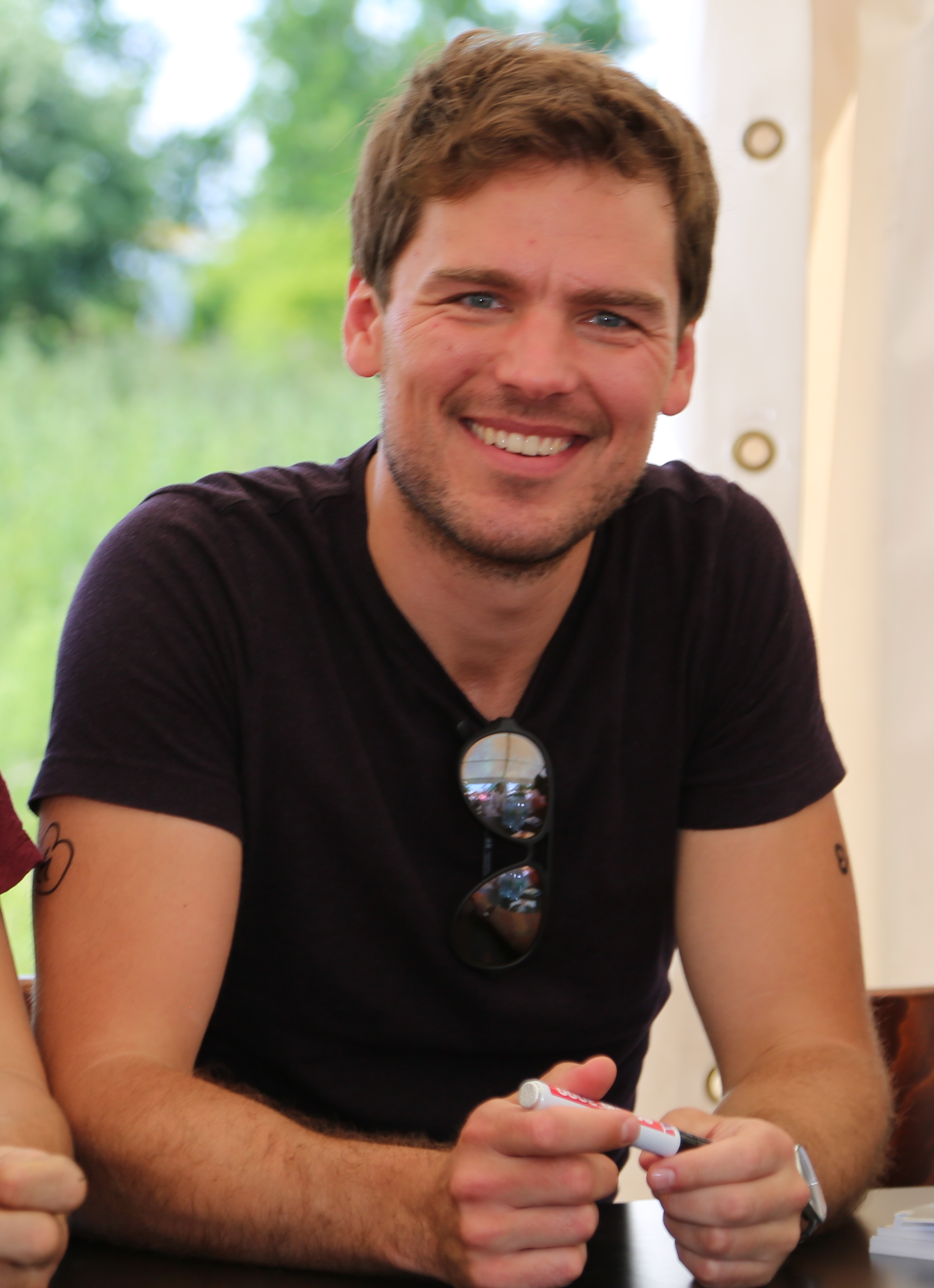 Mickey Hardt und Constantin Lücke schreiben Autogramme beim "Rote Rosen"-Fantag 2017, am 18.06.2017 in Lüneburg.